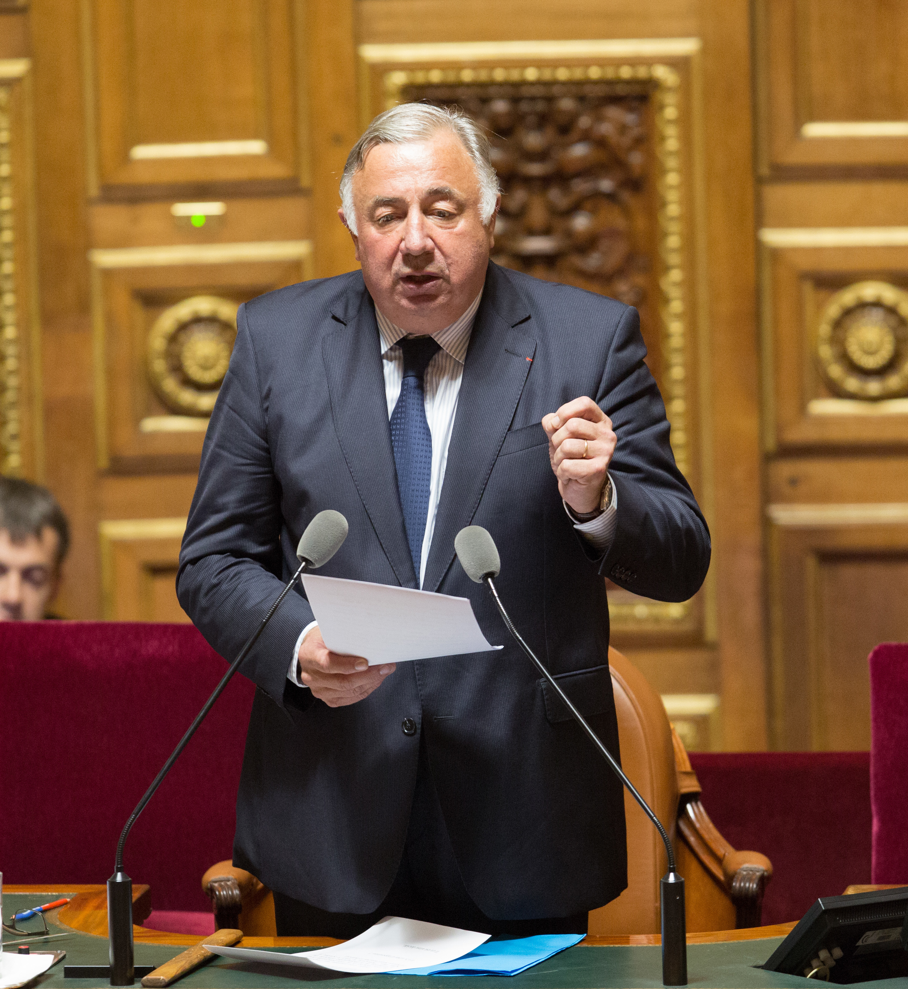 Annonce en séance au Sénat - Plateau